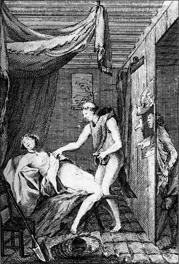 Illustration by François-Rolland Elluin of Dom Bougre, portier des Chartreux by Jean-Charles Gervaise de Latouche (1715-1782)